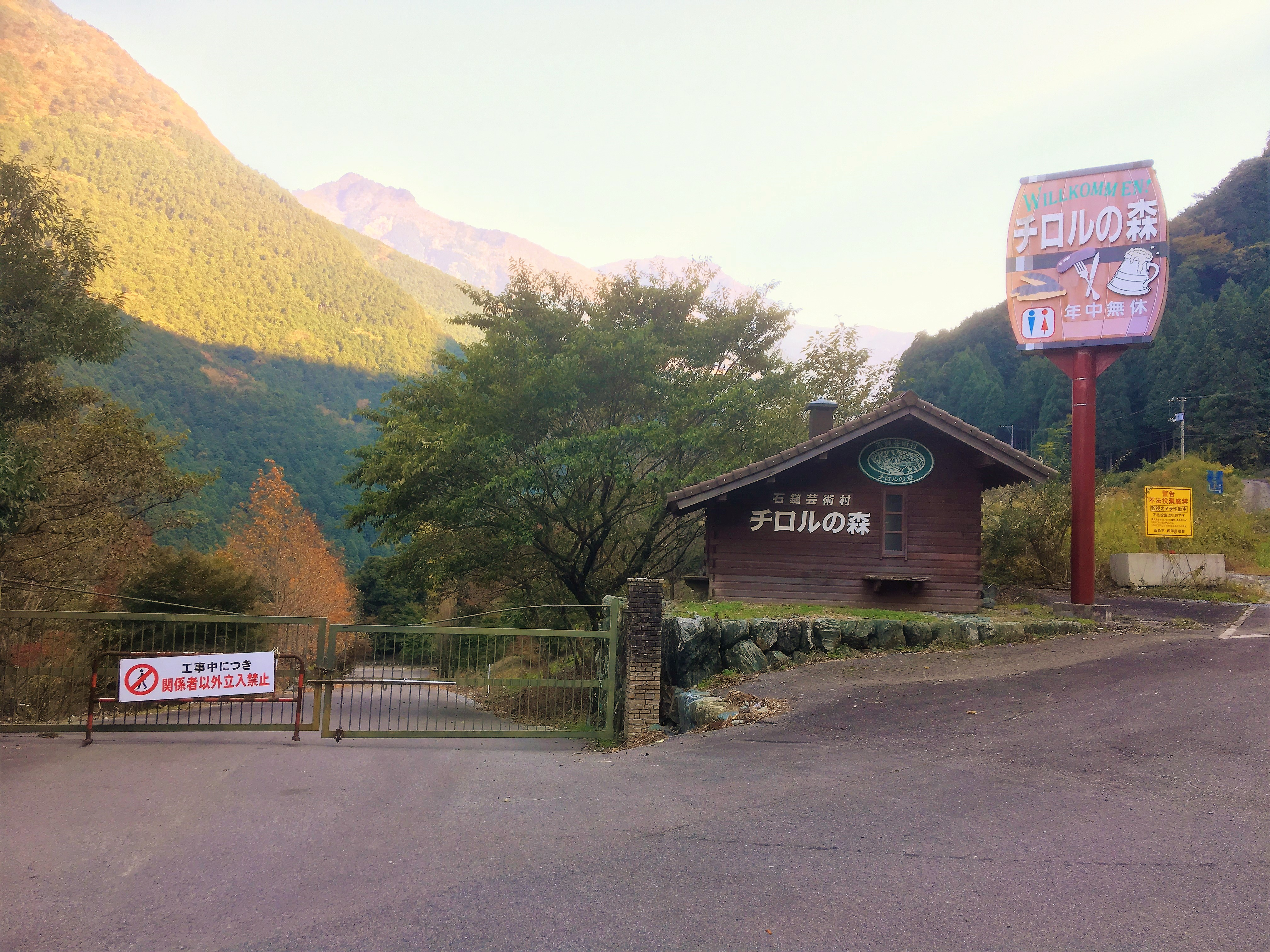 石鎚芸術村チロルの森のゲート